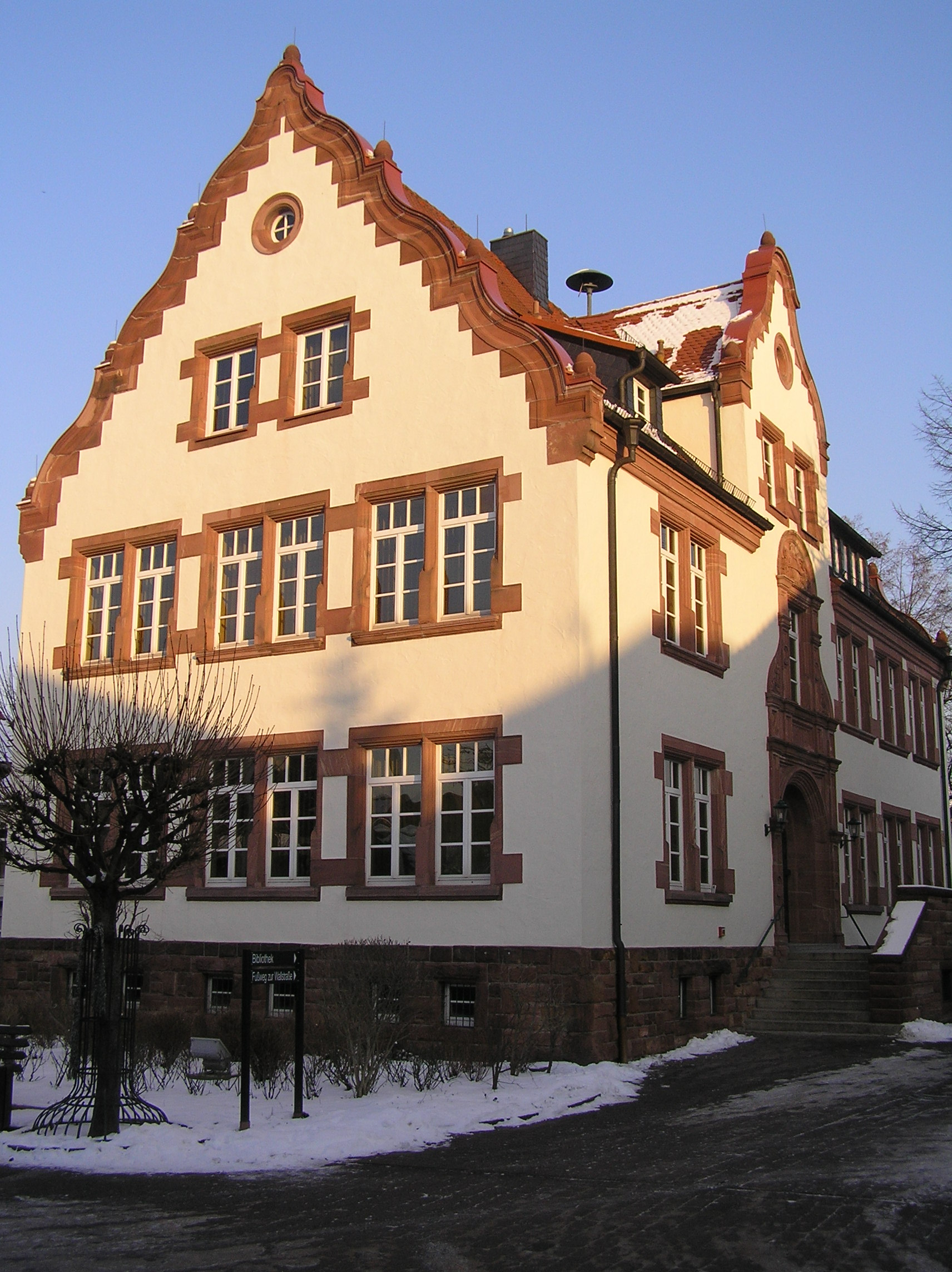 Das Kleinwallstädter Rathaus im Winter